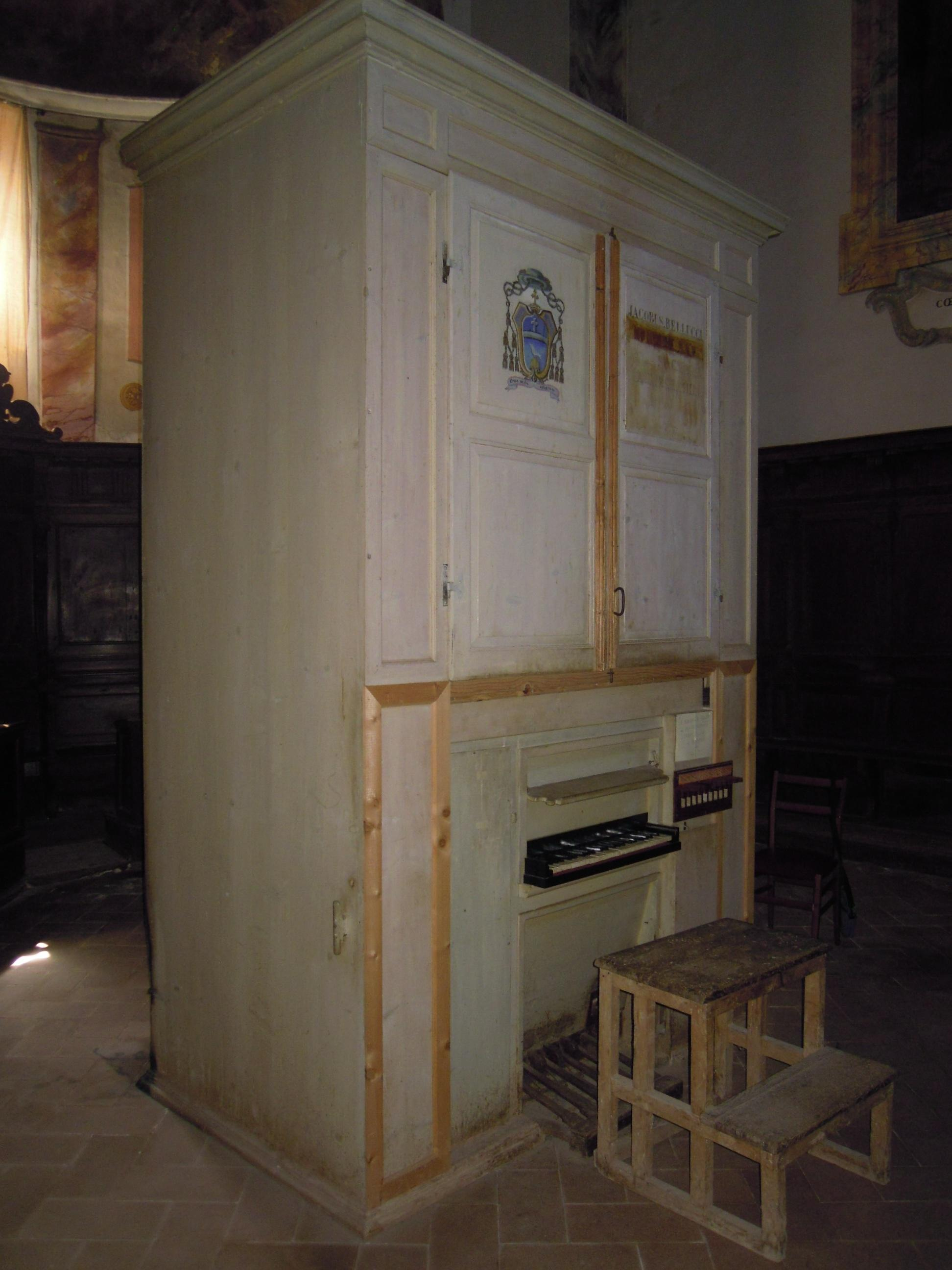 Monastero di Sant'Anna in Camprena, situato all'interno del comune di Pienza, in provincia di Siena, Toscana.